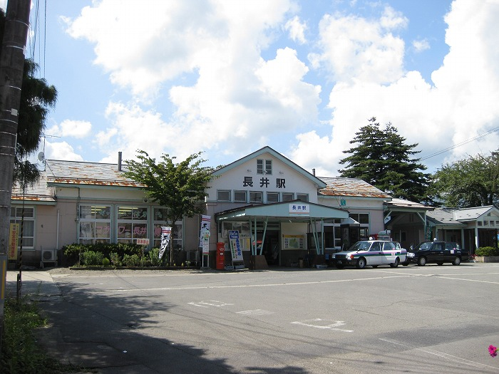 Nagai Station